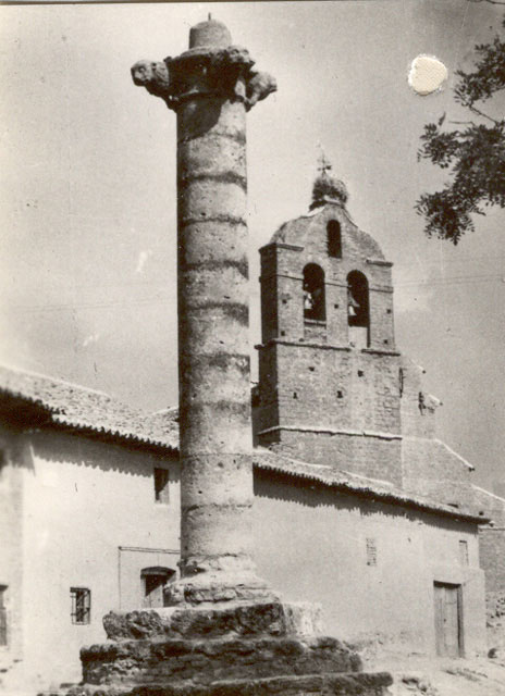 Rollo jurisdiccional - Bolaños de Campos (Valladolid) - Cuaderno. Álbum de Valladolid - Fotografía 42 x 60 B/N